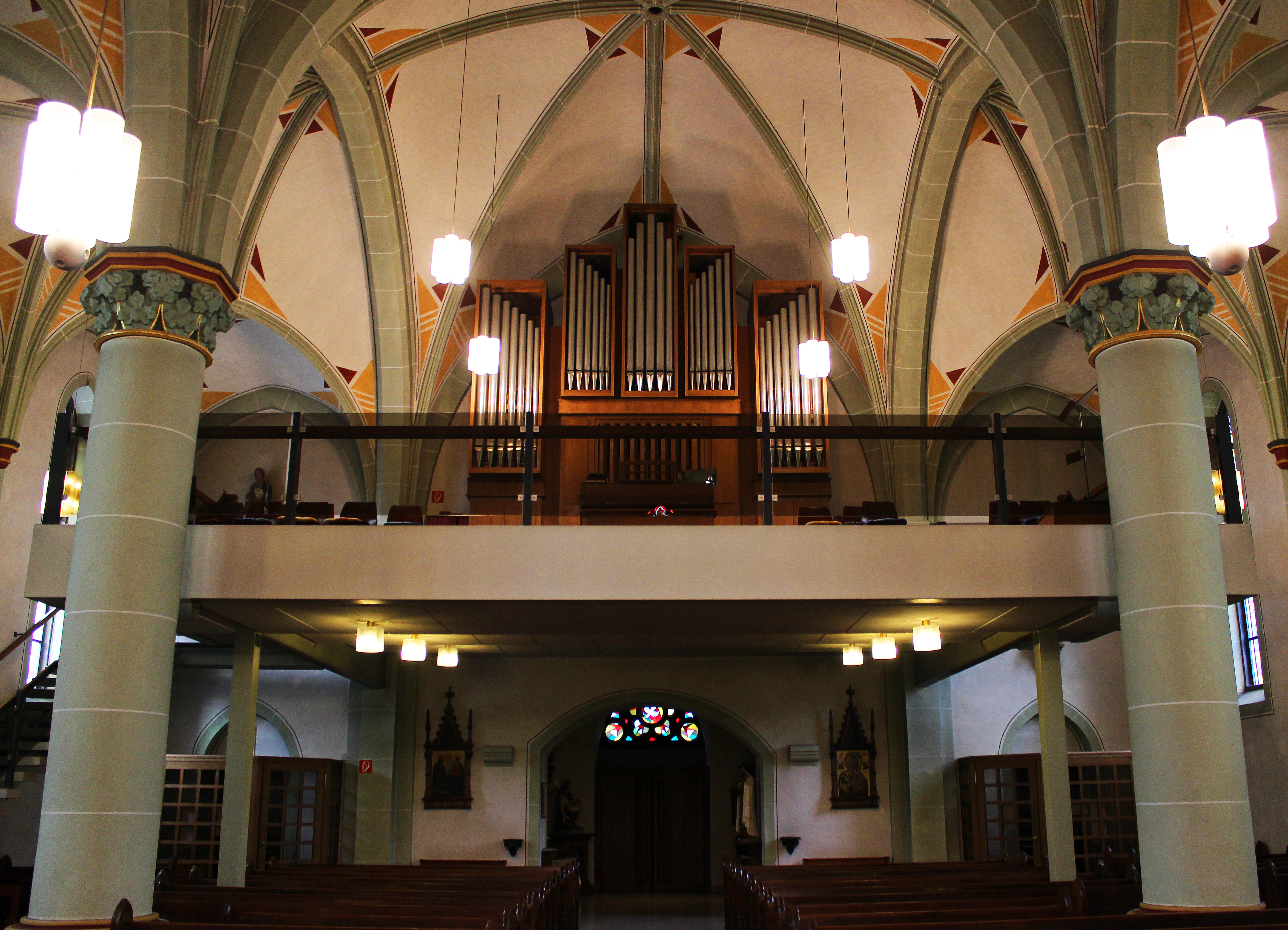 Blick ins Innere der katholischen Pfarrkirche St. Josef in Elm-Derlen, einem Ortsteil der Gemeinde Schwalbach, Landkreis Saarlouis, Saarland